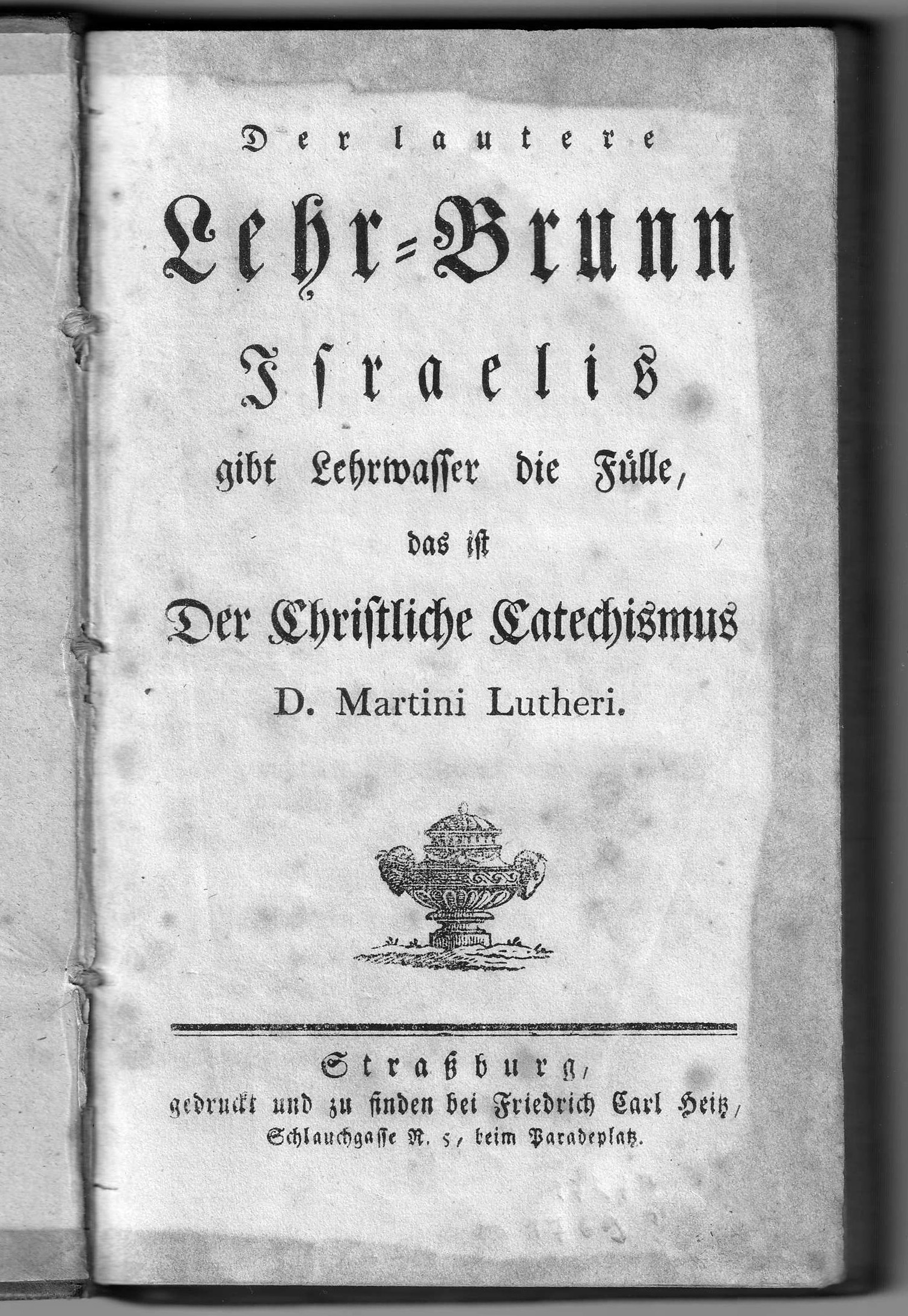 Martin Luther, Der lautere Lehrbrunn Israelis, imprimé à Strasbourg vers 1900. Médiathèque protestante de Strasbourg.